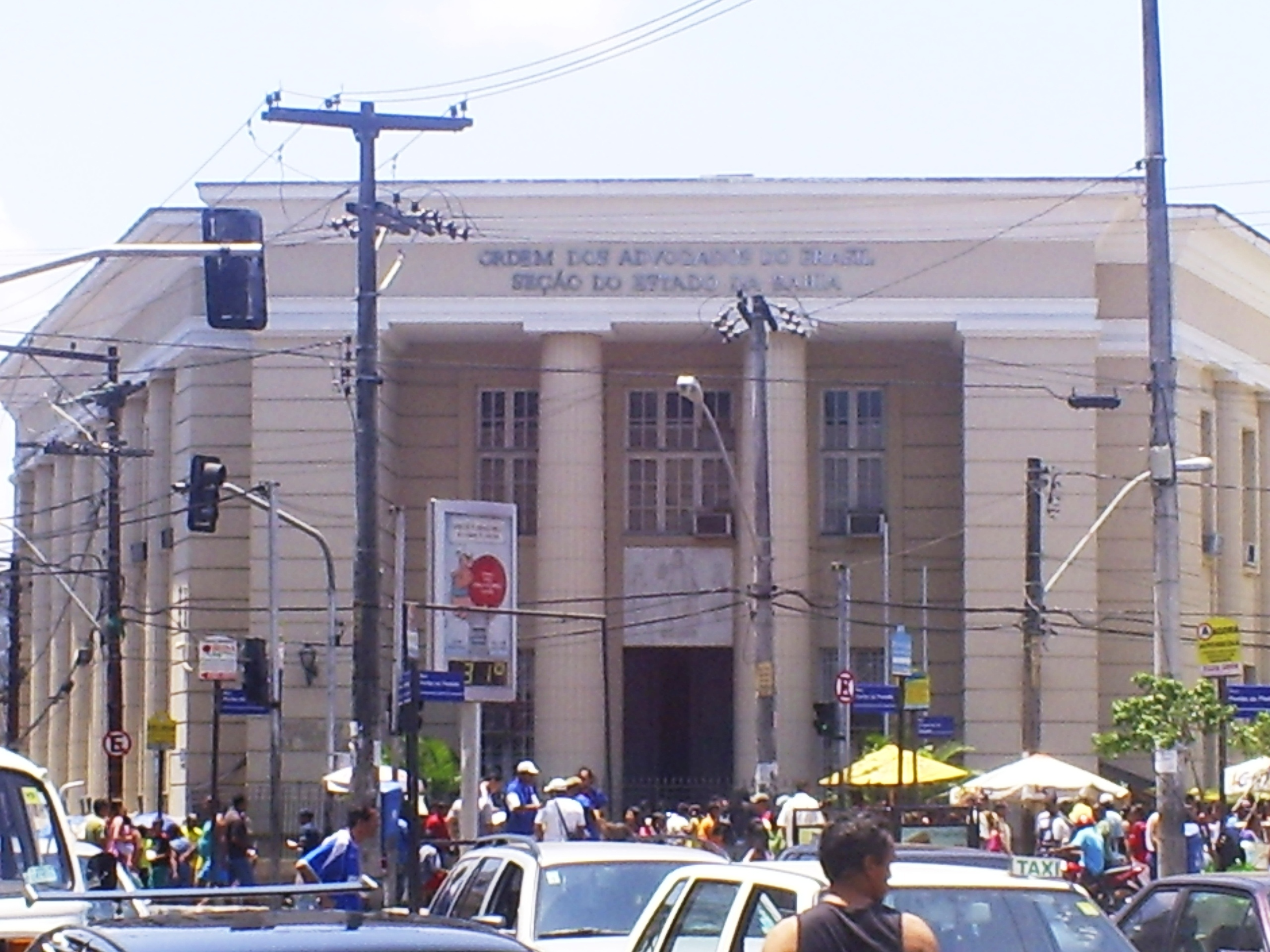 Foto da Ordem dos Advogados do Brasil - Seção do Estado da Bahia, Salvador, Bahia, Brasil.